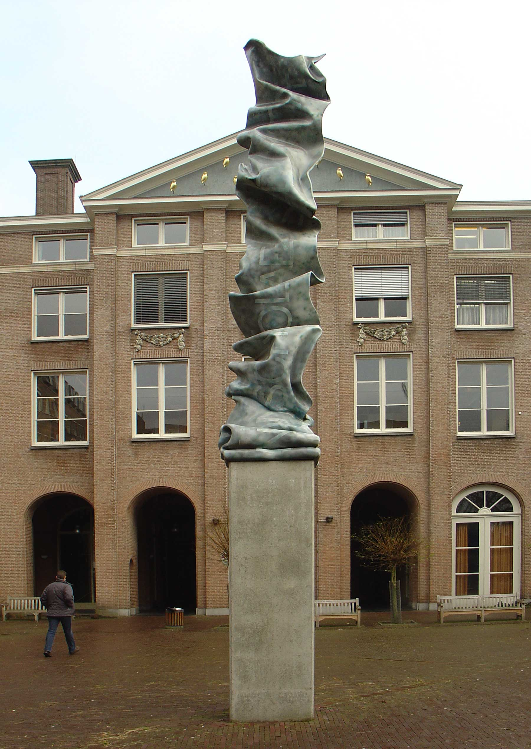 "Non scholea, sed vitae" door Marte Röling - Groningen (bij het Harmoniegebouw)